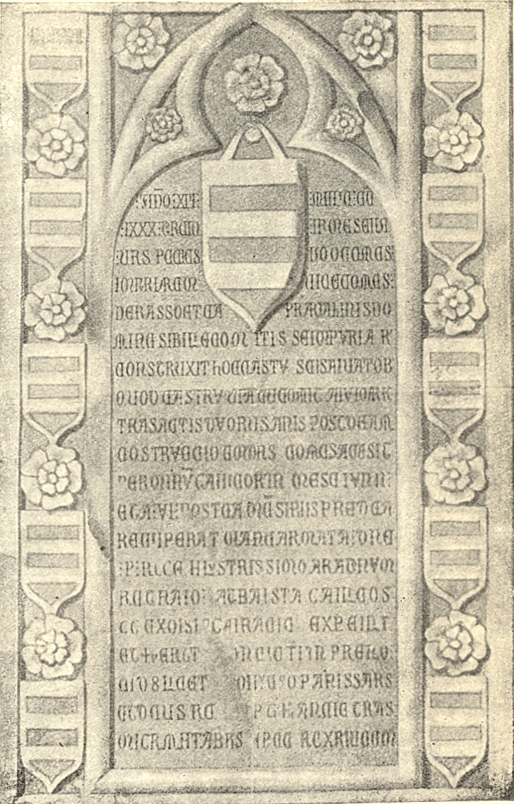 Dibuix d'una làpida commemorativa de la reconstrucció del castell de Verdera (Alt Empordà) el 1283 i de la derrota de la croada contra la Corona d'Aragó el 1285, que havia estat sobre la porta del castell i que actualment es troba en localització desconeguda. Text: ANNO CHRISTI / MILLESSIMO // .LXXX. TERCIO / IN MENSE JULII // DOMINUS PONCIUS / UGO, COMES // IMPURIARUM, / VICECOMES // DE BASSO ET CA / PRARIA, FILIUS DOMINE SIBILIE, COMITISSE IMPURIARUM, // CONSTRUXIT HOC CASTRUM SANCTI SALVATORIS, // QUOD CASTRUM UNA CUM COMITATU IMPURIARUM, // TRANSACTIS DUOBUS ANNIS POST DICTAM // CONSTRUCCIONEM, DOMINUS COMES AMISIT // PER GUERRAM GALLICORUM IN MENSE JUNII, // ET A .VI. POSTEA MENSIBUS PREDICTA, // RECUPERAVIT MANU ARMATA DOMINE PETRI, REGE ILLUSTRISSIMO ARAGONUM // REGNANTE, A TERRA ISTA GALLICOS // ET EXOISI ET A FRANCIE EXPELLIT // ET FUERUNT VINCITI IN PROELIO // ET DILIGENTER AD COLLUM DE PANISSARS, // ET DOMINUS REX ... FRANCIE TRANS // MIGRAVIT ANTE DICTAM SPULSIONEM